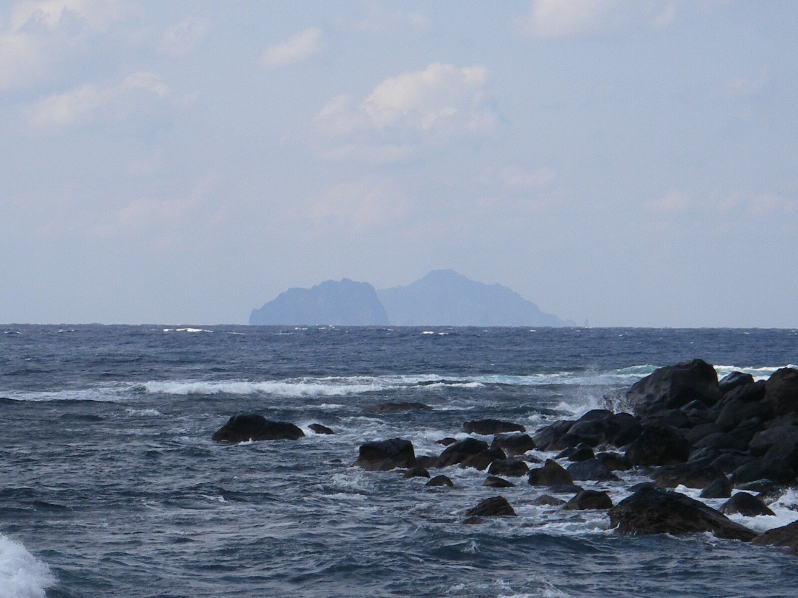 臥蛇島と小臥蛇島（十島村中之島から撮影） 撮影者：20nana75の親族（本人の了解済） 撮影日：2007年3月8日